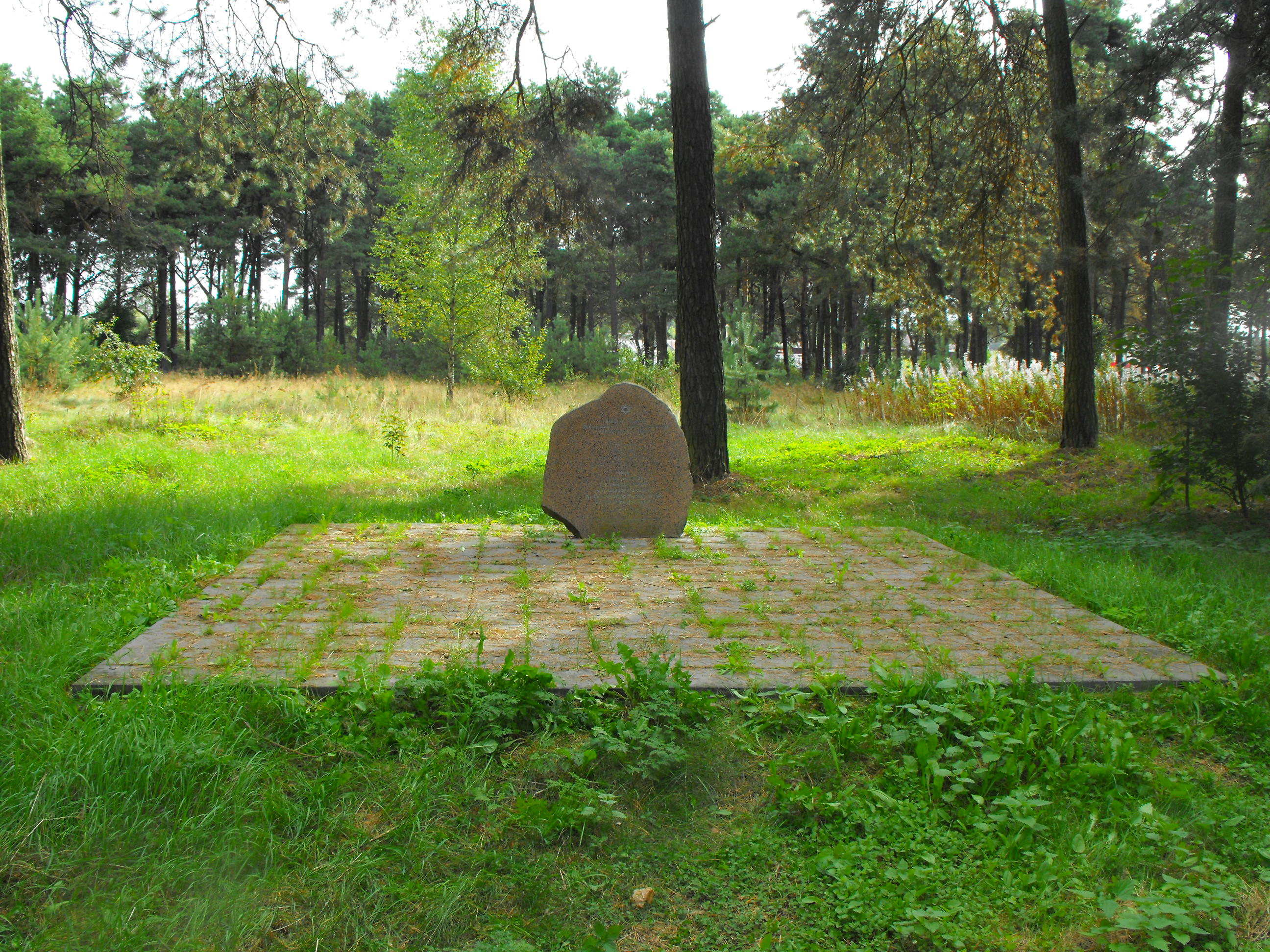 Памятник на еврейском кладбище Ракова 112 евреям Раковкого гетто с надписью: "Жертвам нацизма. Тут осенью 1941 г. зверски замучены 112 евреев деревни Раков". Вход на кладбище находится на улице Пушкина напротив дома № 2.